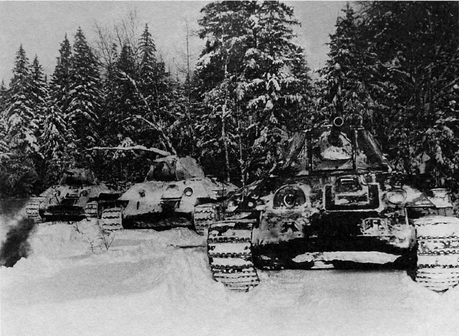 Танки Т-34 32-й танковой бригады перед атакой под Тулой, ноябрь 1941 года. Машины не имеют белой окраски, а присыпаны снегом.